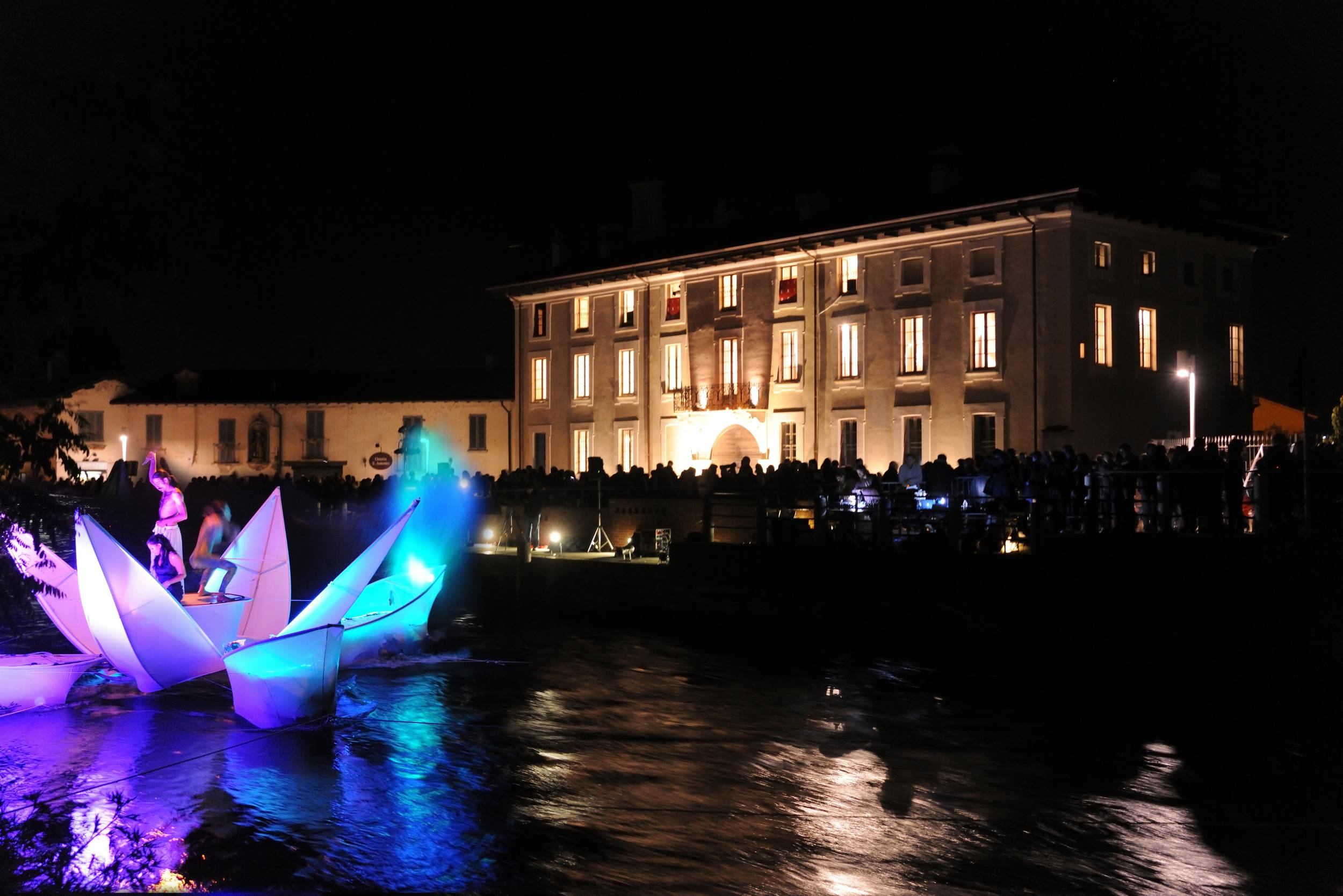 Palazzo Stampa This is a photo of a monument which is part of cultural heritage of Italy.